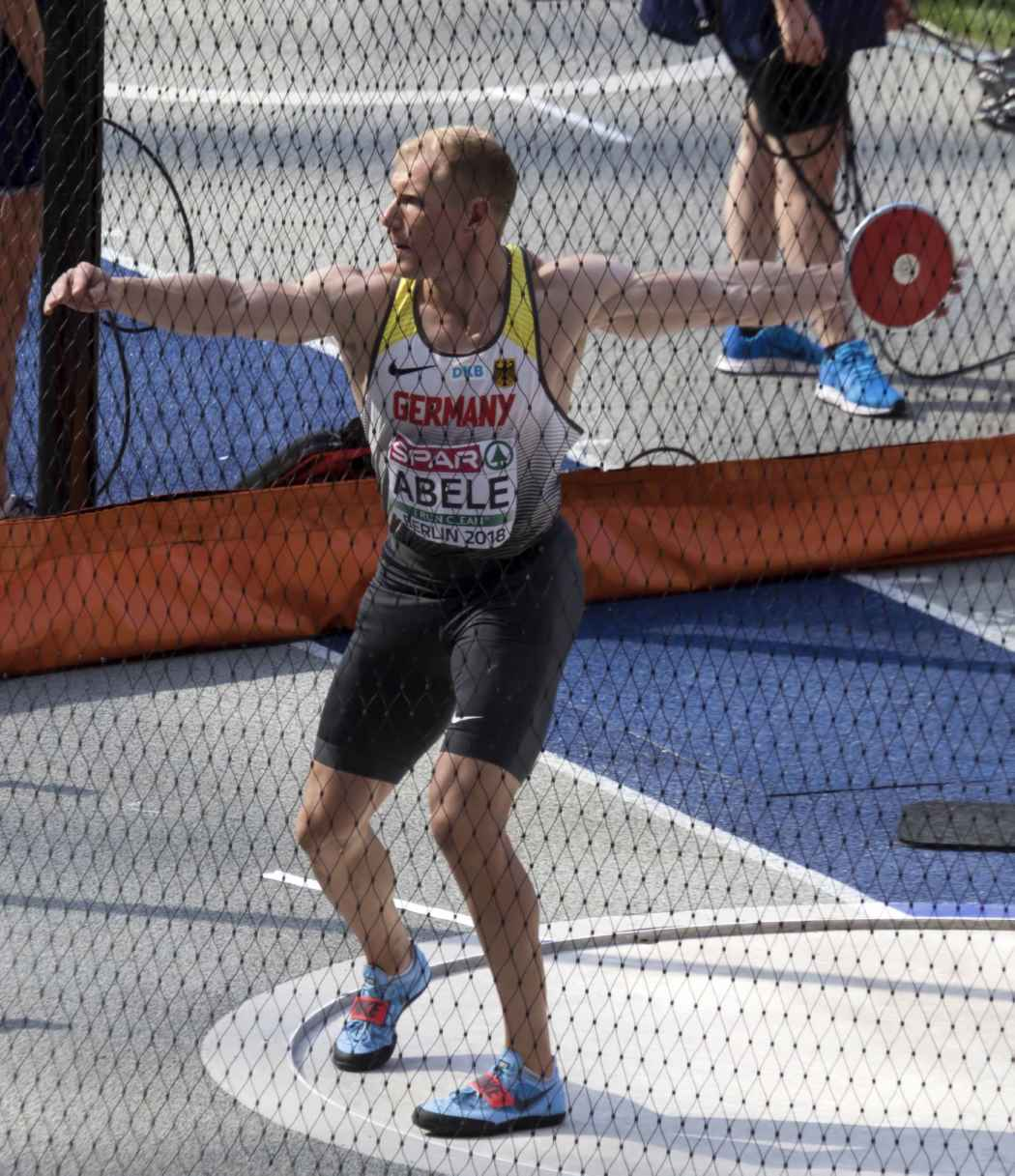 EKB21015 abele